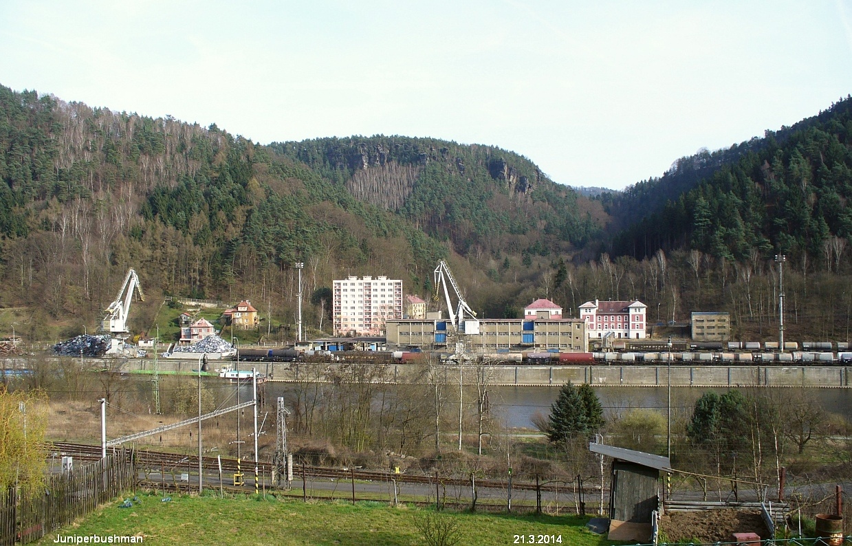 Pohled na Loubí z Horního Žlebu